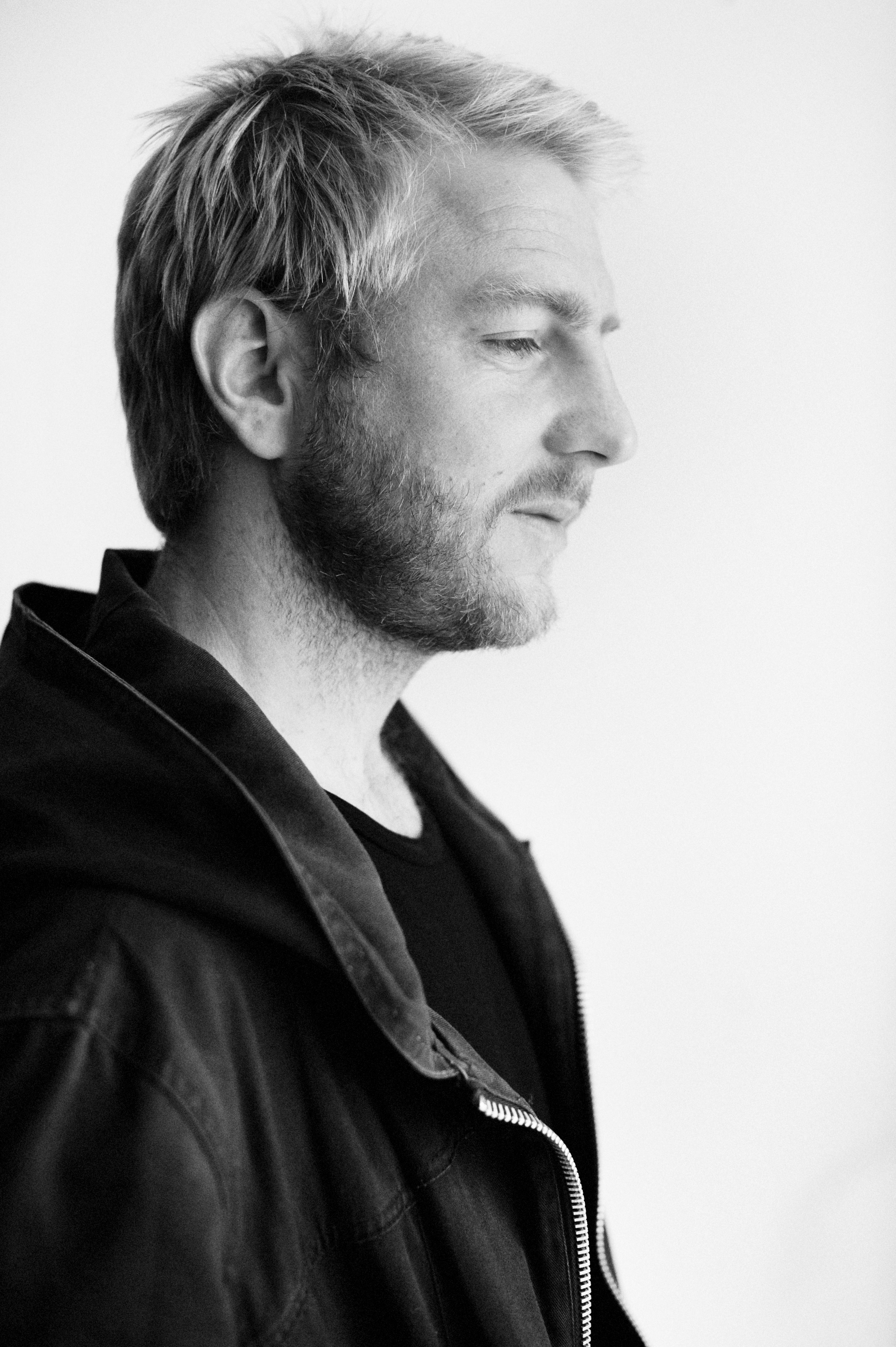 Portræt af dokumentarfilm instruktøren, Christian Sønderby Jepsen